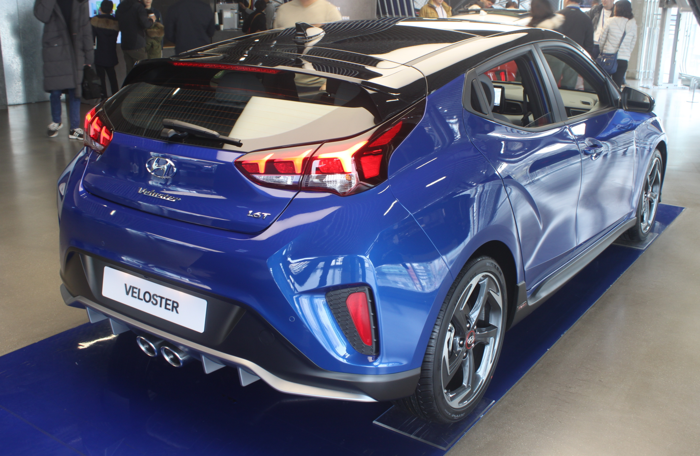 현대 벨로스터 2세대 후측면